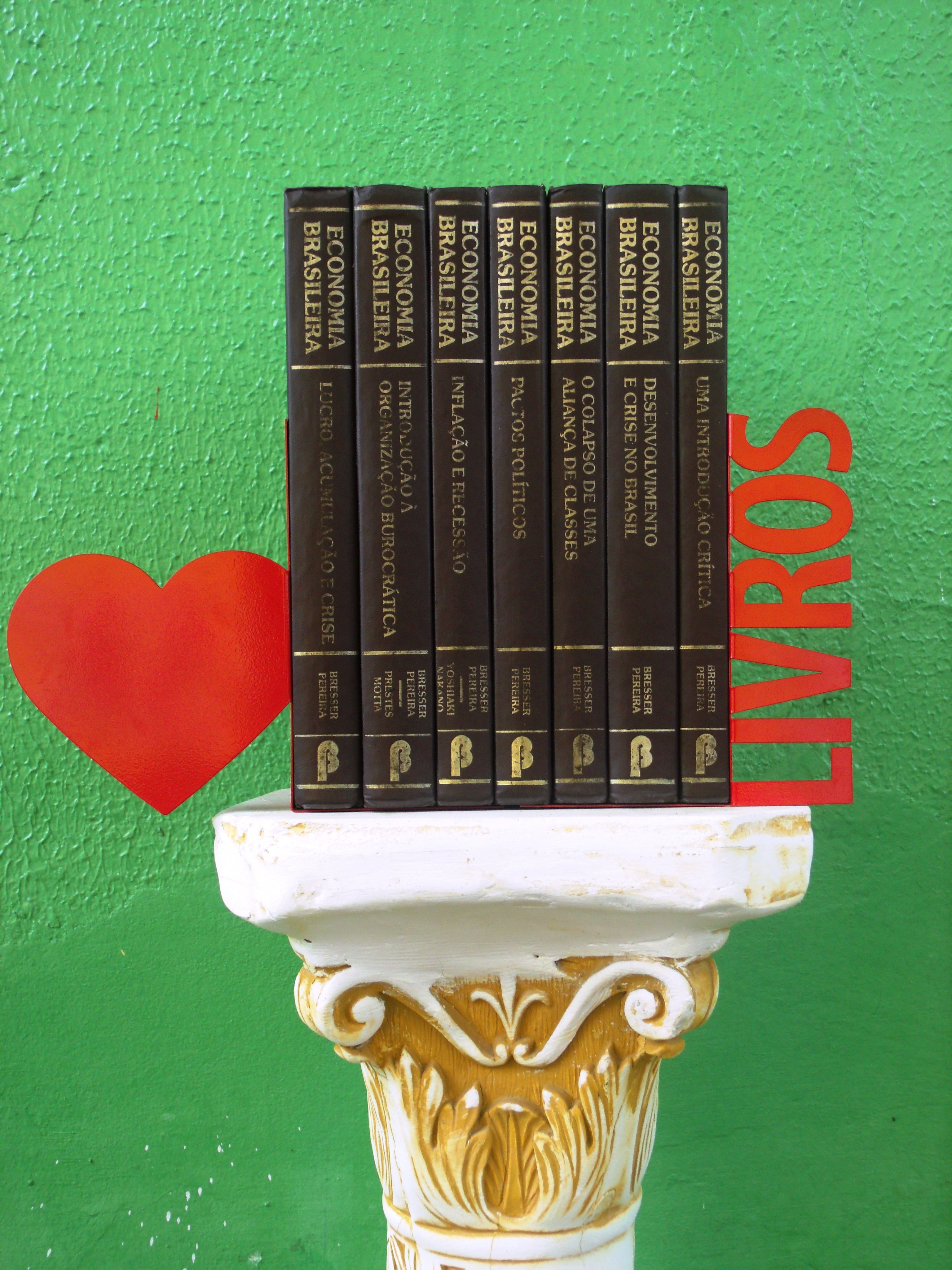 Exposição de algumas obras do pensador economista brasileiro Bresser Pereira.